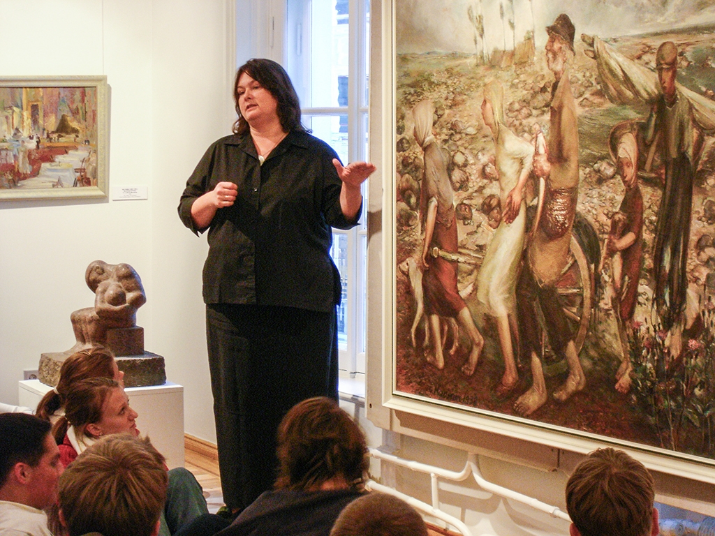 Reeli Kõiv Tartu Kunstimuuseumis muuseumitundi läbi viimas. Foto Eve Kiiler